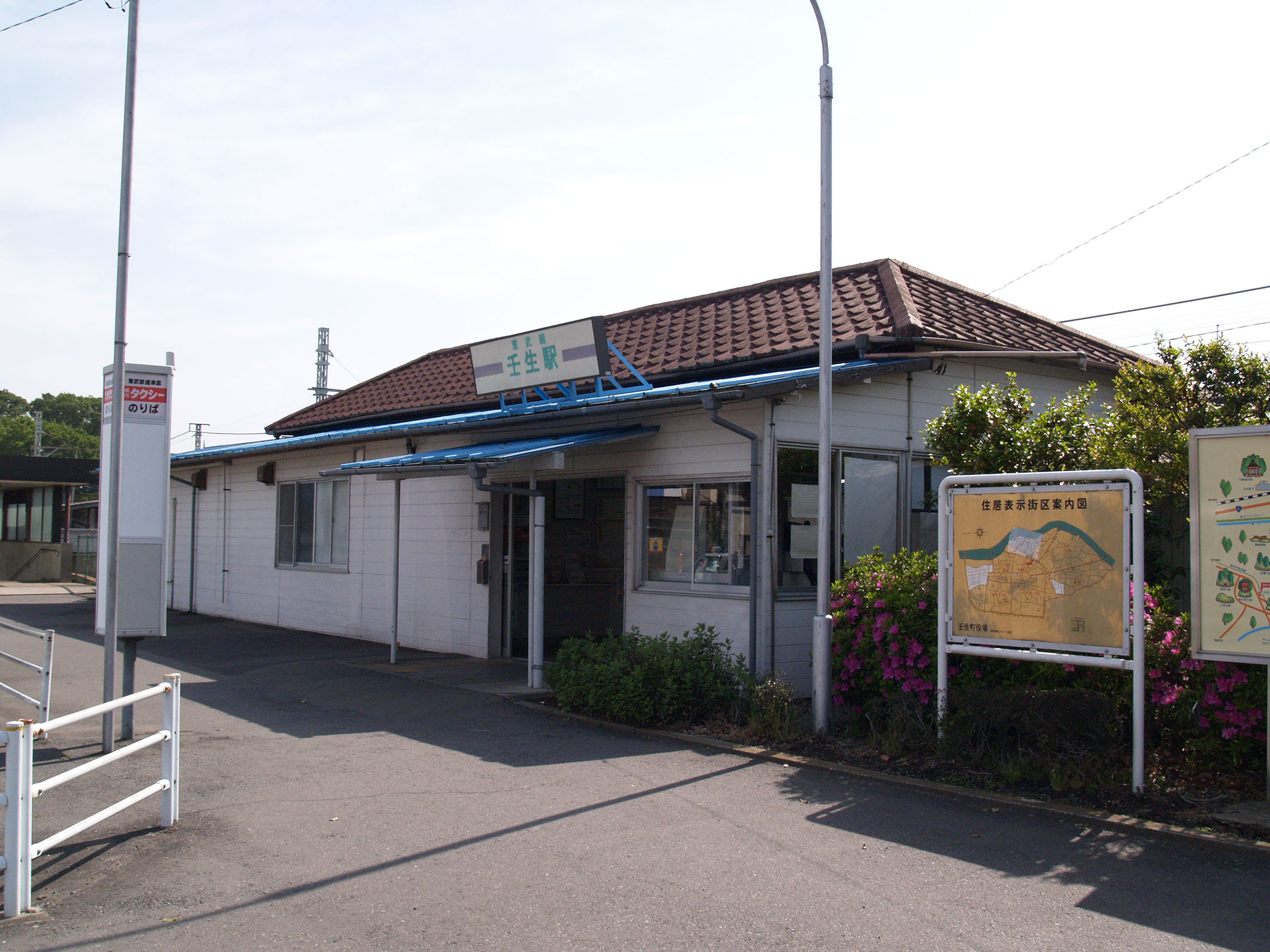 壬生駅